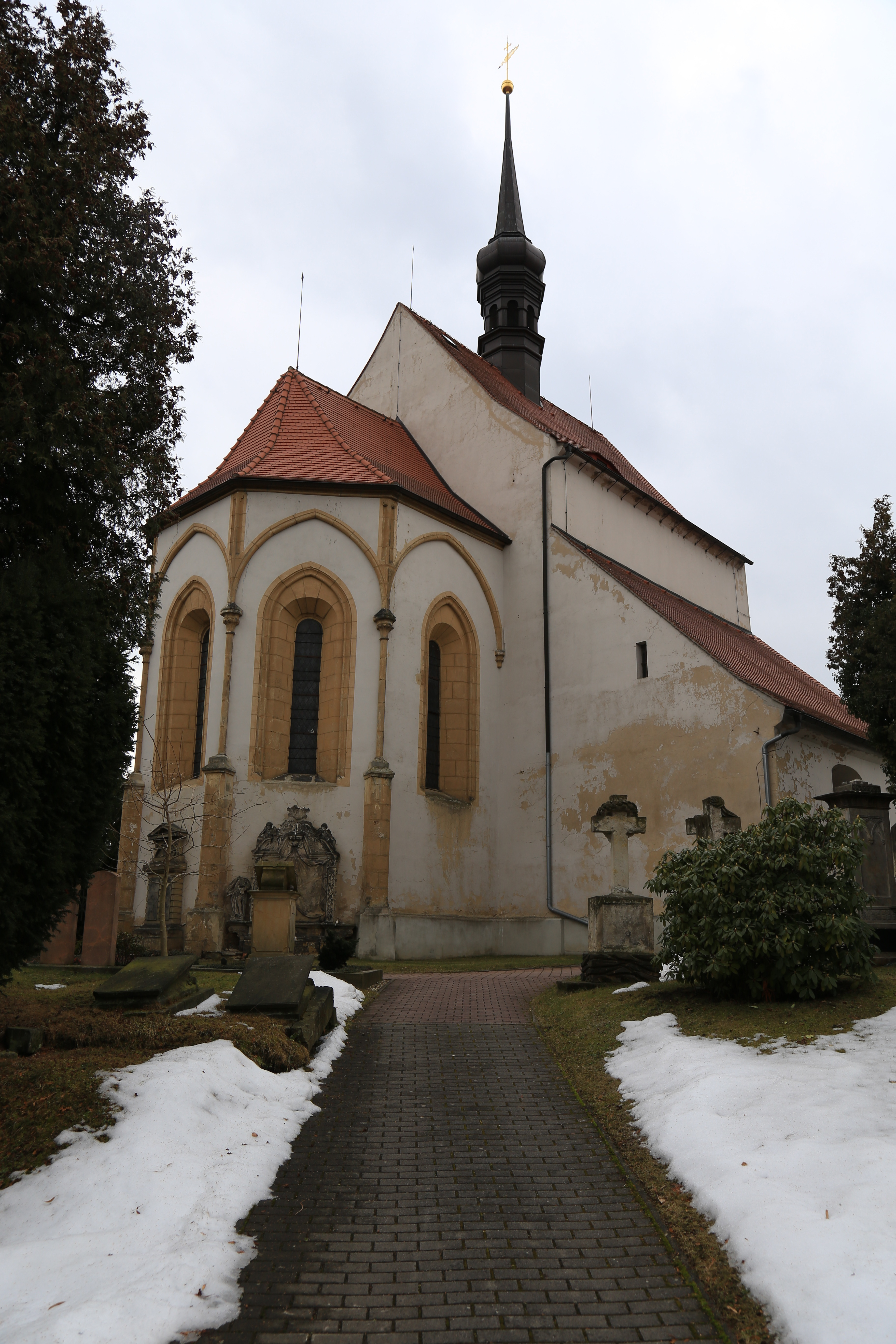 Zittau Frauenkirche (18)